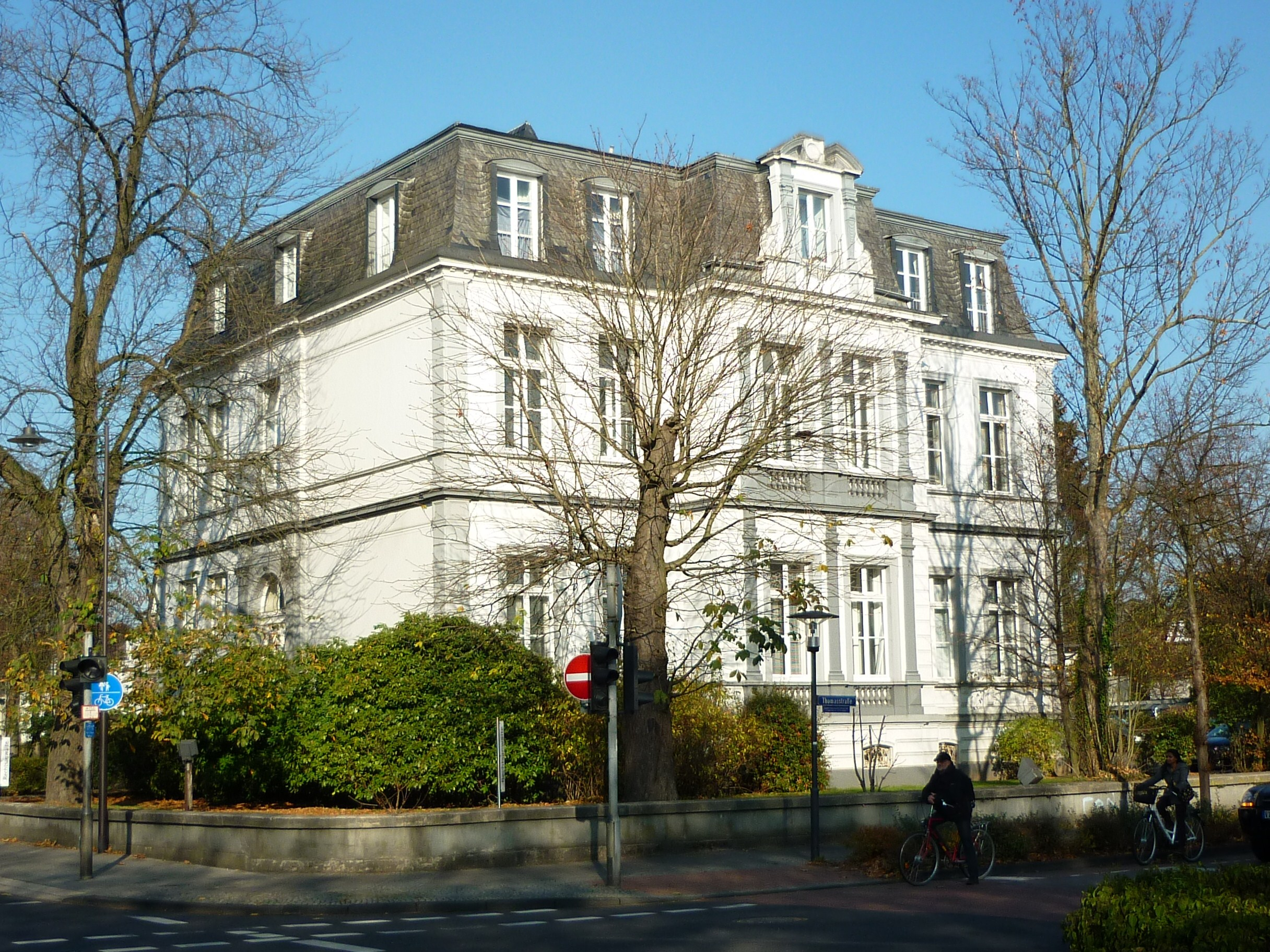 Kempen, Burgring 73, Villa Horten This image shows a heritage building in Germany, located in the North Rhine-Westphalian city Kempen (no. 96).